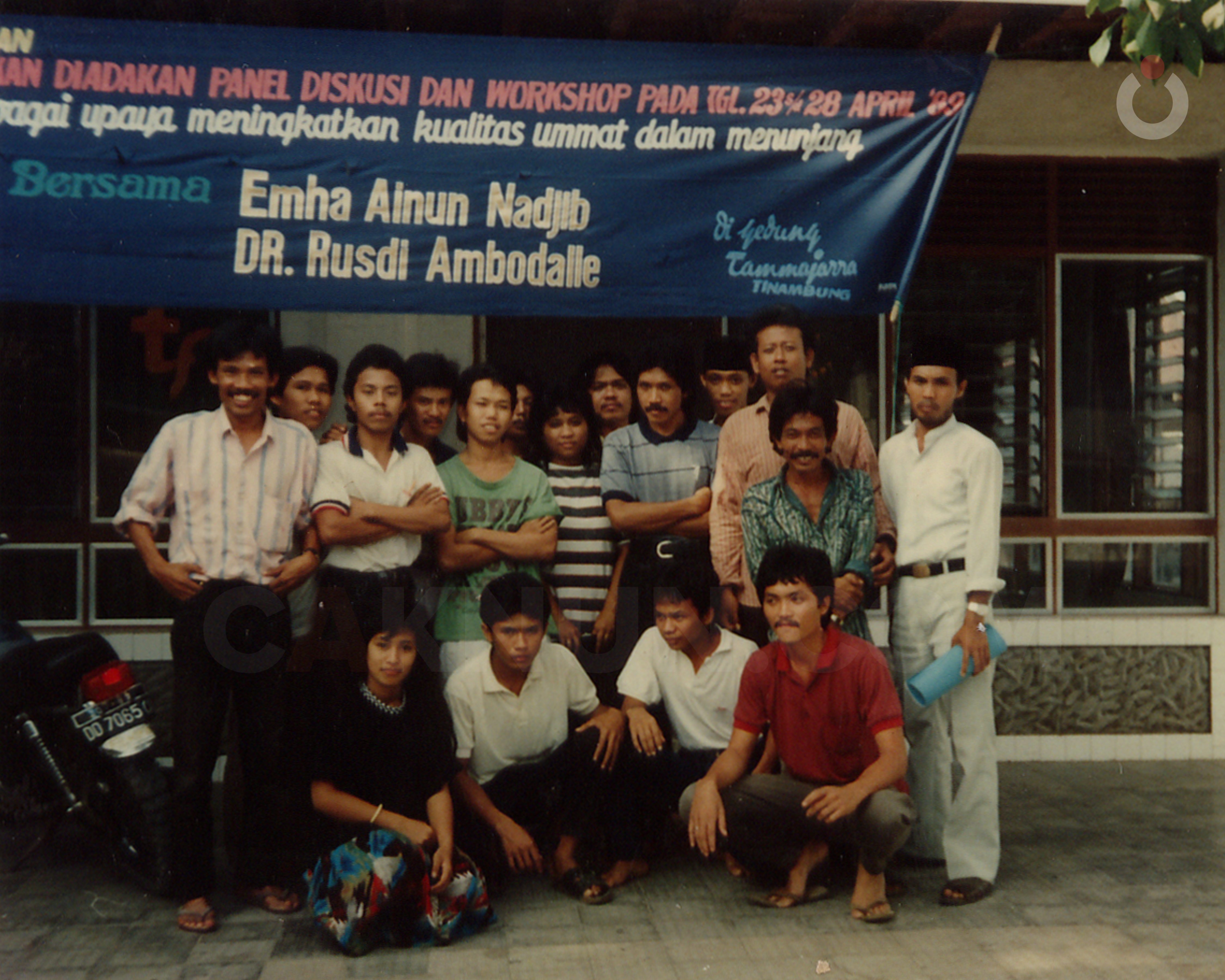 Emha Ainun Nadjib dan Nevi Budianto bersama Teater Flamboyant di Tinambung, April 1989.